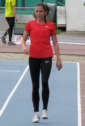 Nadja Käther beim DLV WM-Testwettkampf 2011 im Stadion der MTG Mannheim.